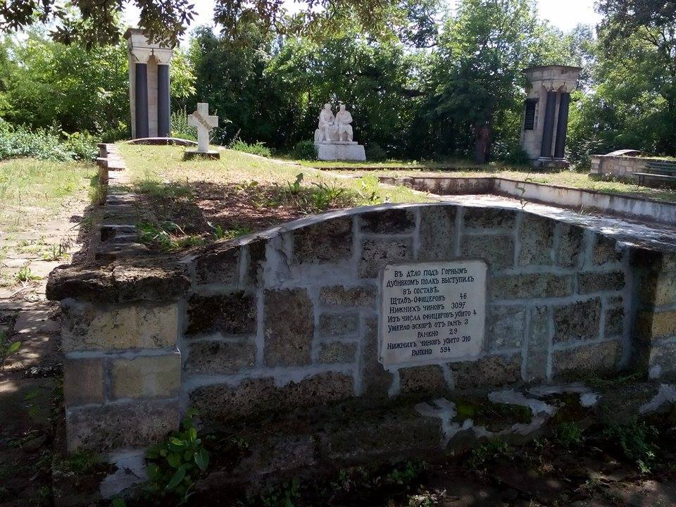 братска могила на войници от ЛГ гренадирски полк загинали на 24 октомври 1877 край Горни Дъбник